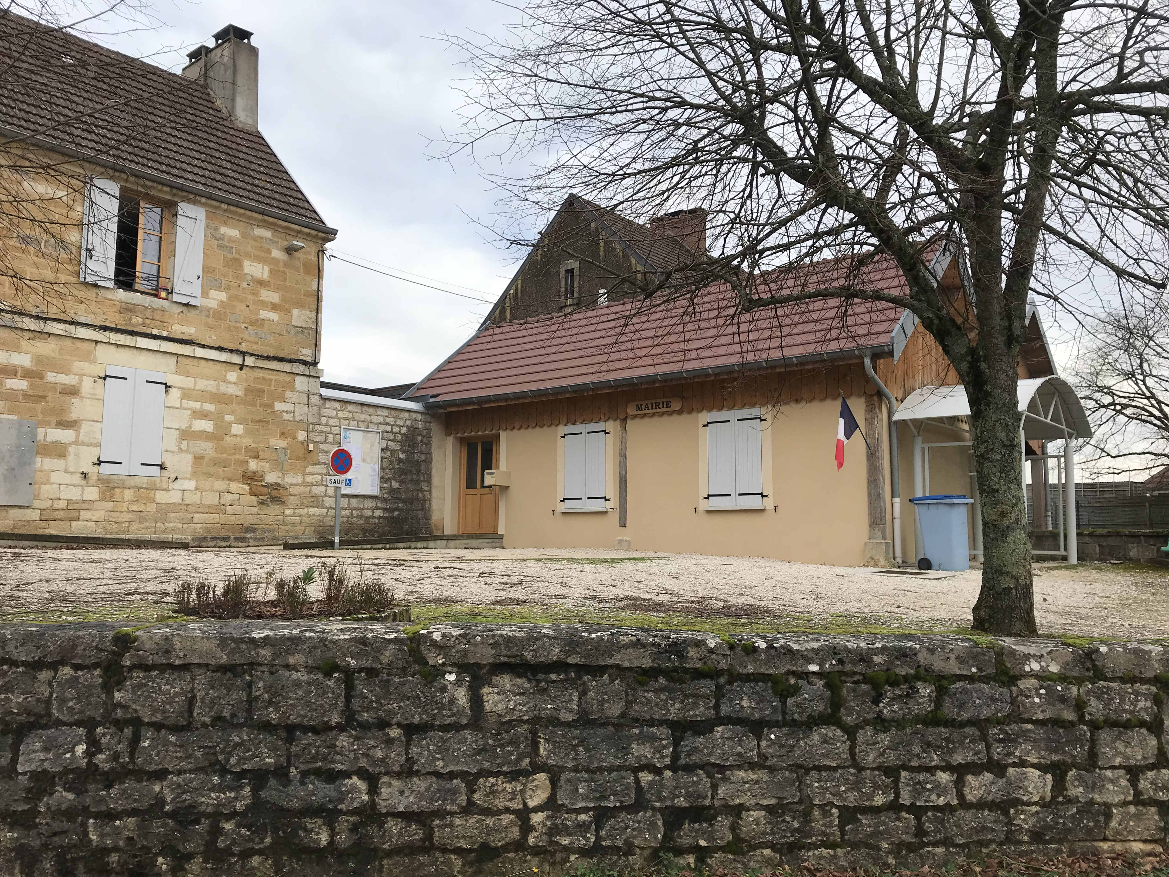 Champrougier (Jura, France) en janvier 2018.